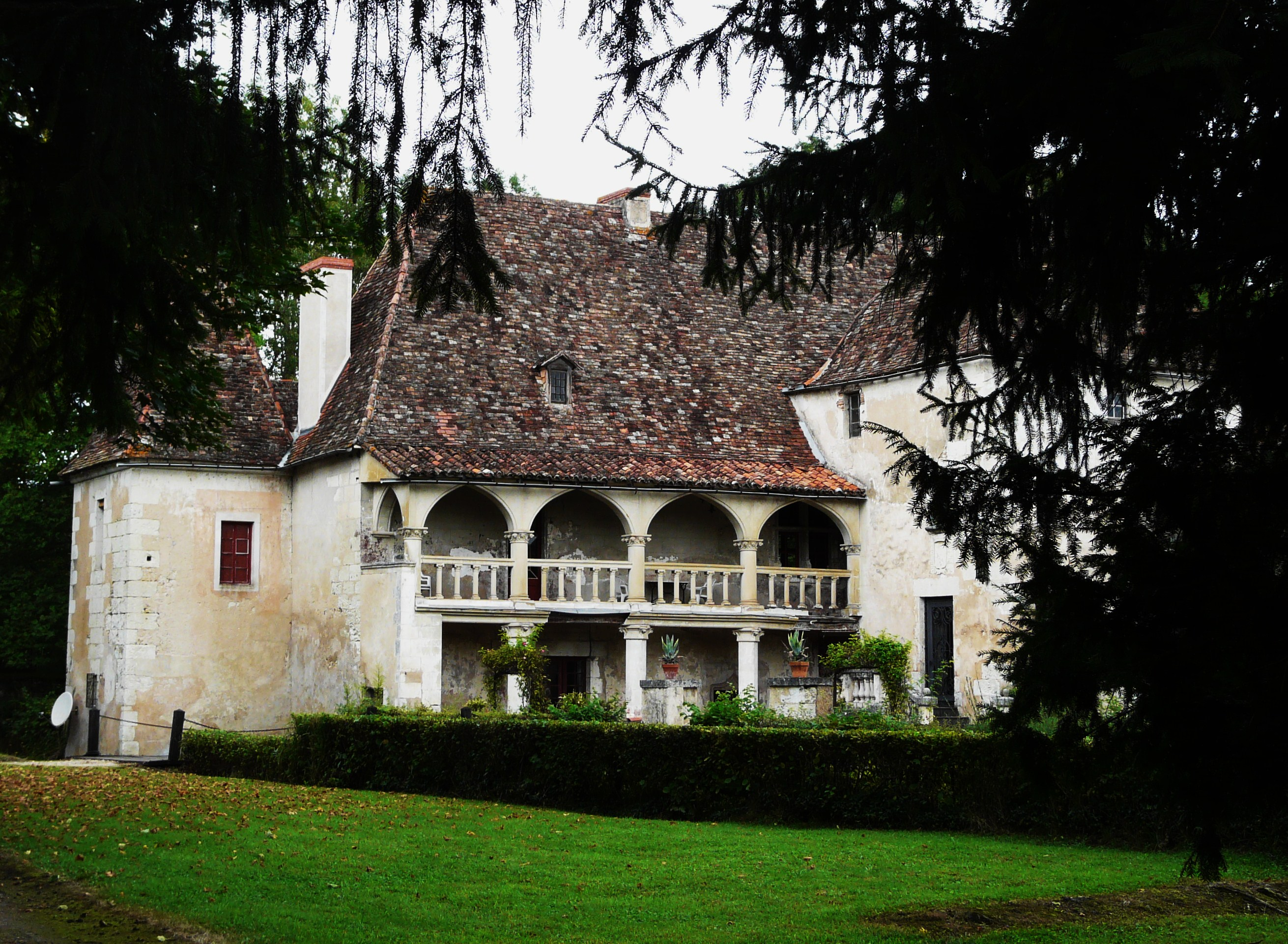 Château de Saint-Germain-du-Salembre, Dordogne, France Object location45° 08′ 20.5″ N, 0° 27′ 02.7″ E .